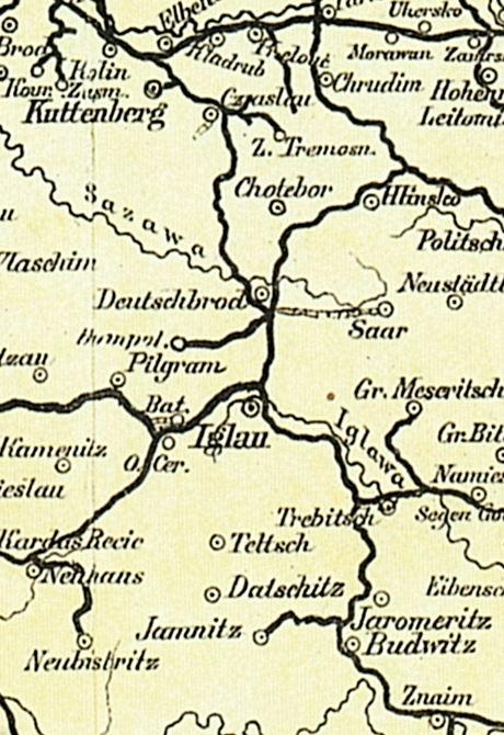 Ausschnitt Kolin/Znaim aus der Bahnkarte_Deutschland_1899